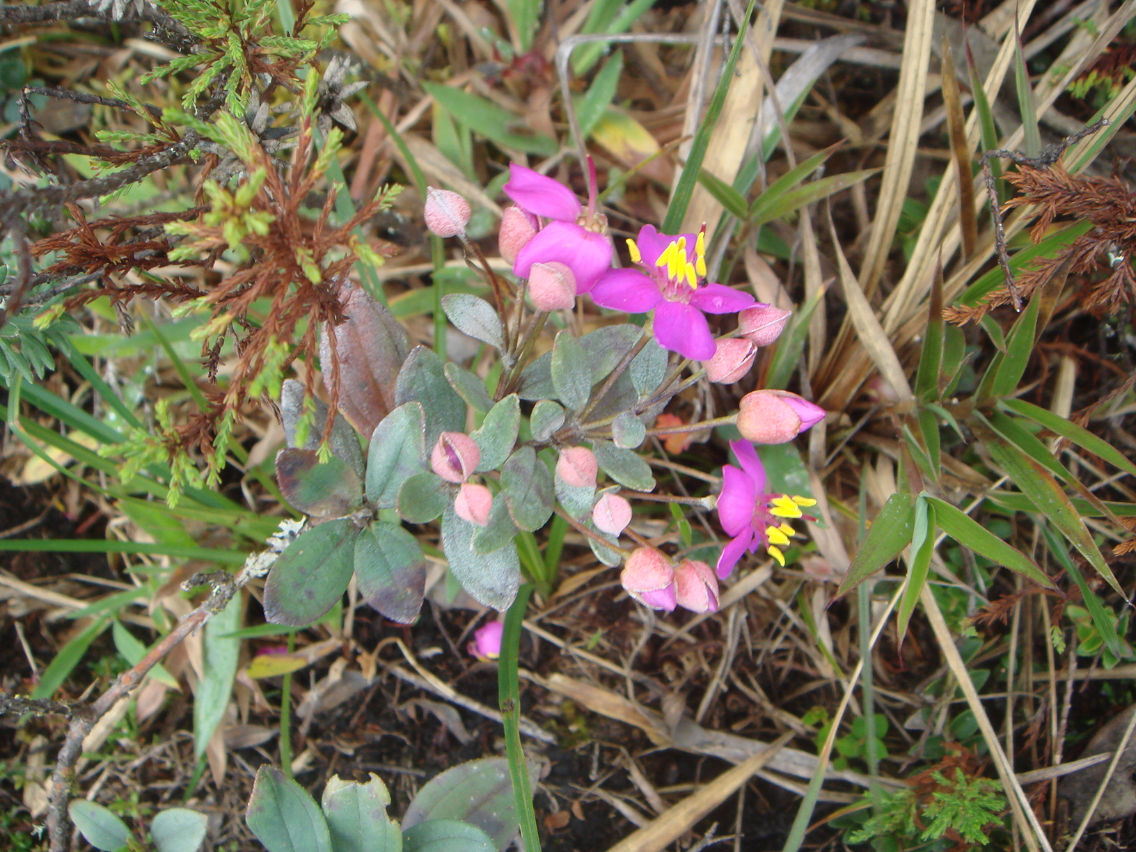 Charne (Bucquetia glutinosa) Páramo de Guasca, Colombia.